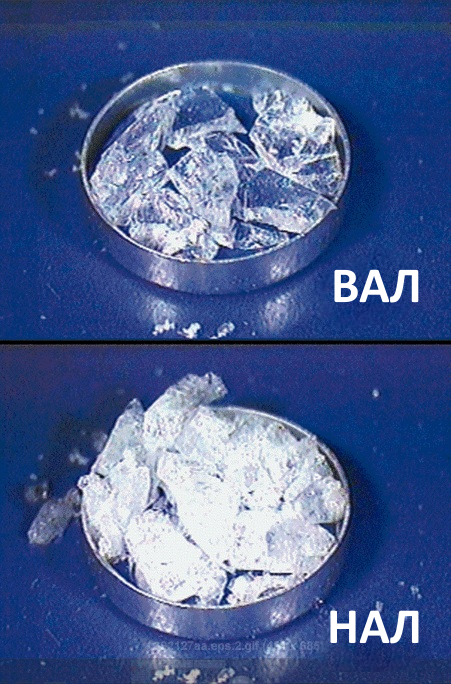 Високощільний (ВАЛ) та низькощільний (НАЛ) аморфні льоди